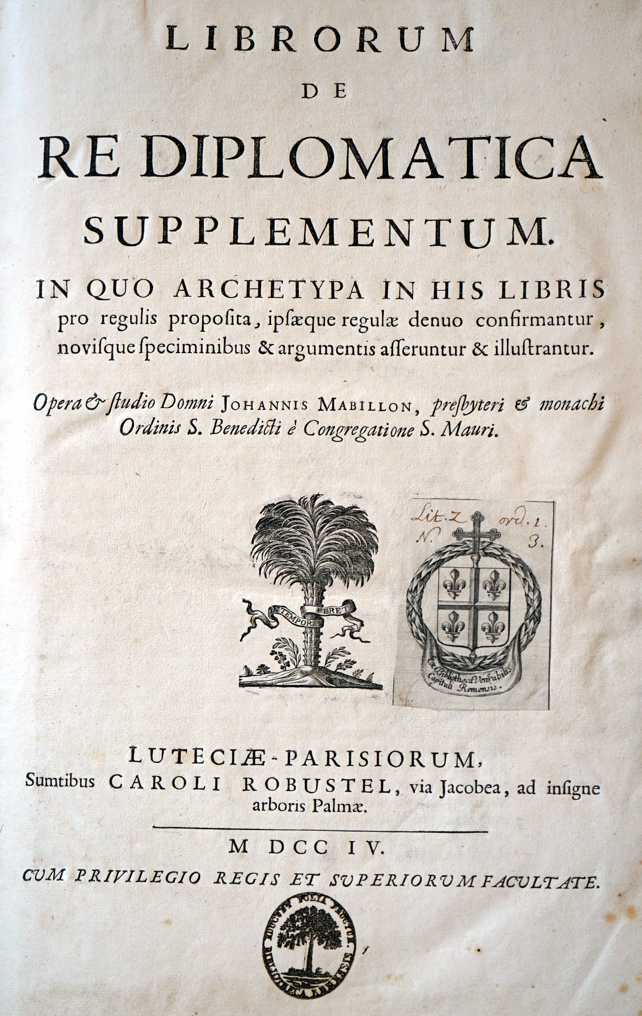 cf. voir titre.